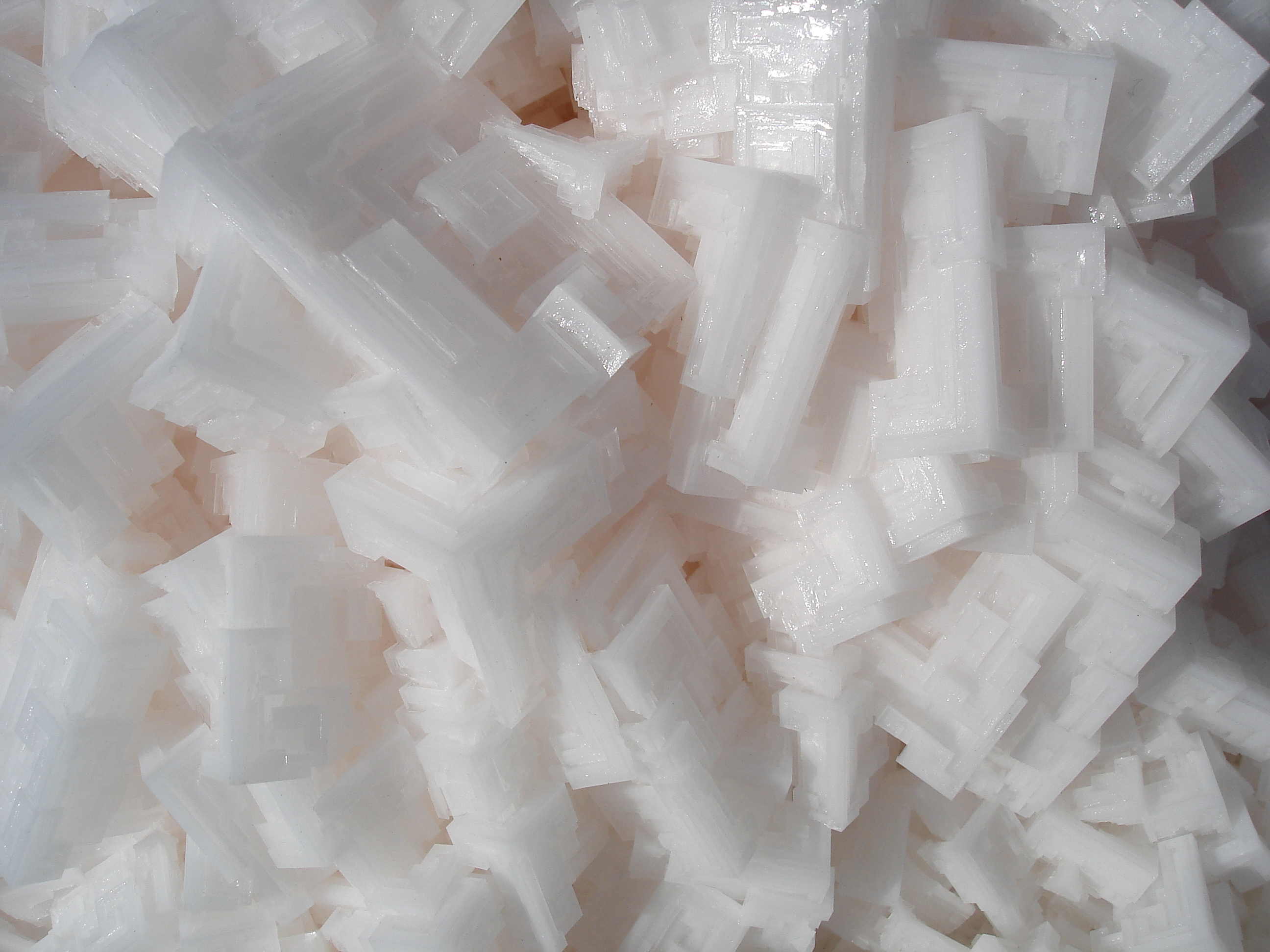 Salt cristal Kalloni Saltworks